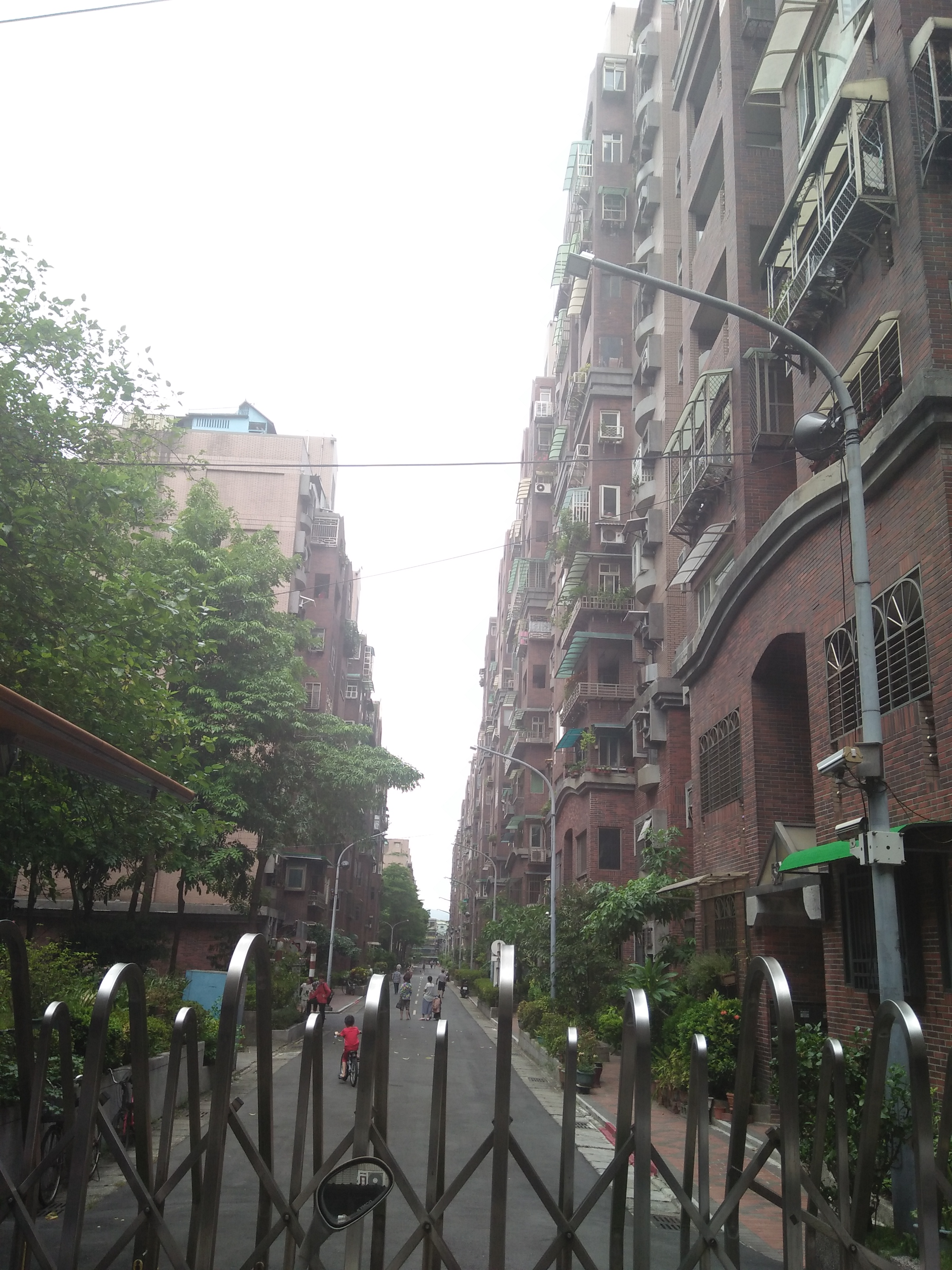 新北市板橋區大庭新村東口